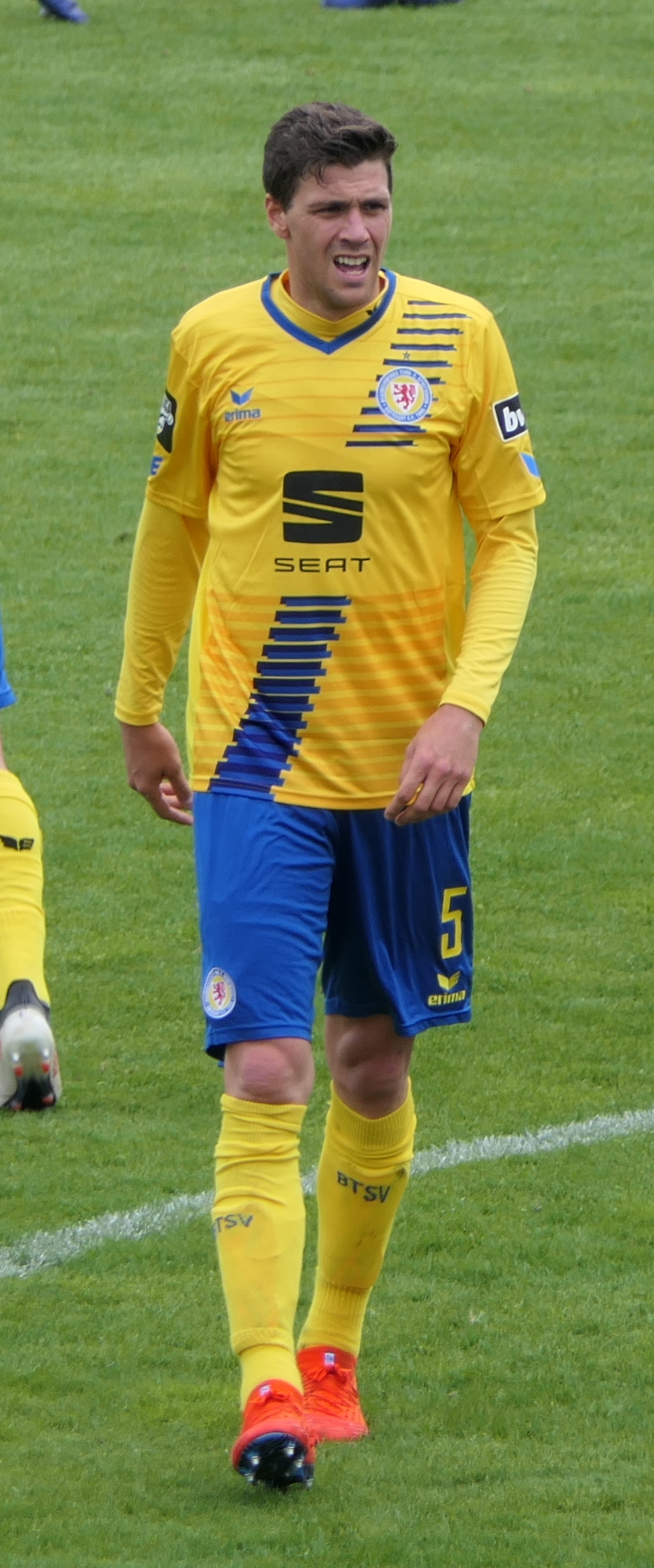 Der Fussballprofi Benjamin Kessel im Trikot von Eintracht Braunschweig beim Auswärtsspiel beim VfR Aalen am 05.05.2019.